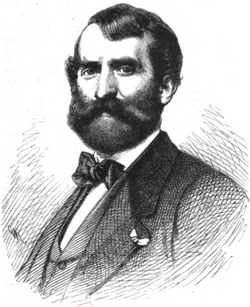 Ferdinand Heilbuth.